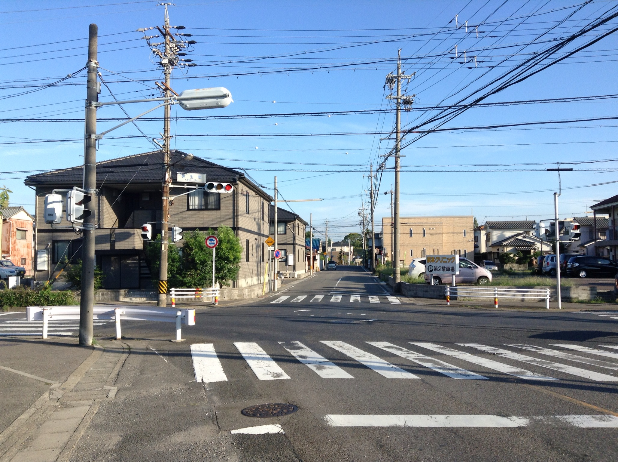 春日井市弥生町交差点